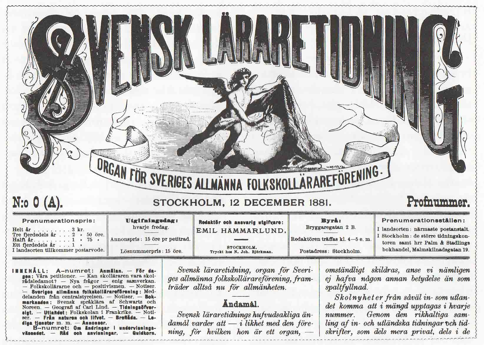 Svensk Läraretidning